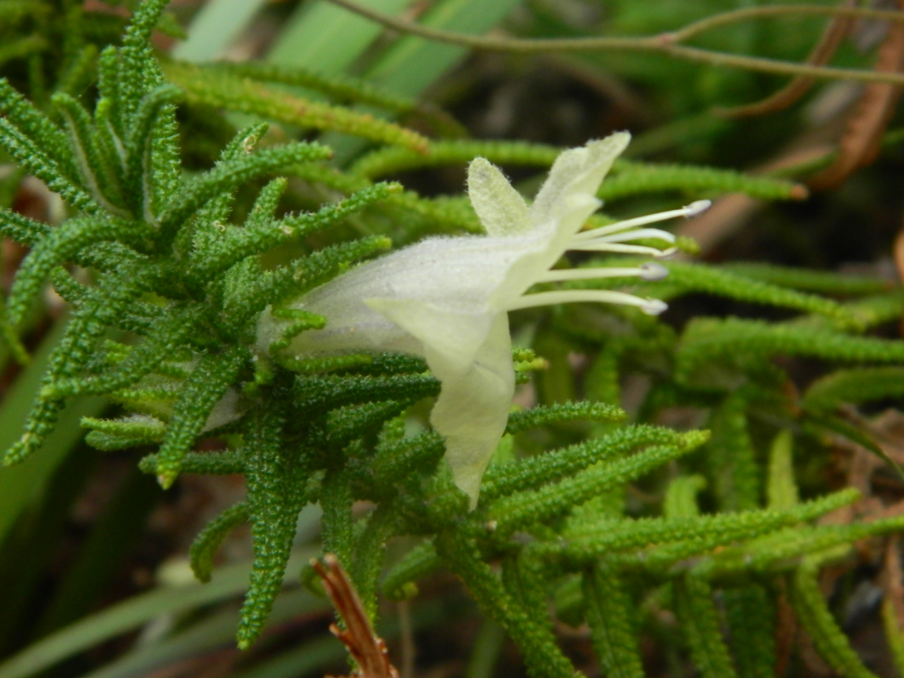 Chloanthes stochaedis